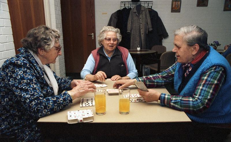 Altenbegegnungsstätte in Bonn-Bad Godesberg, Dürenstraße